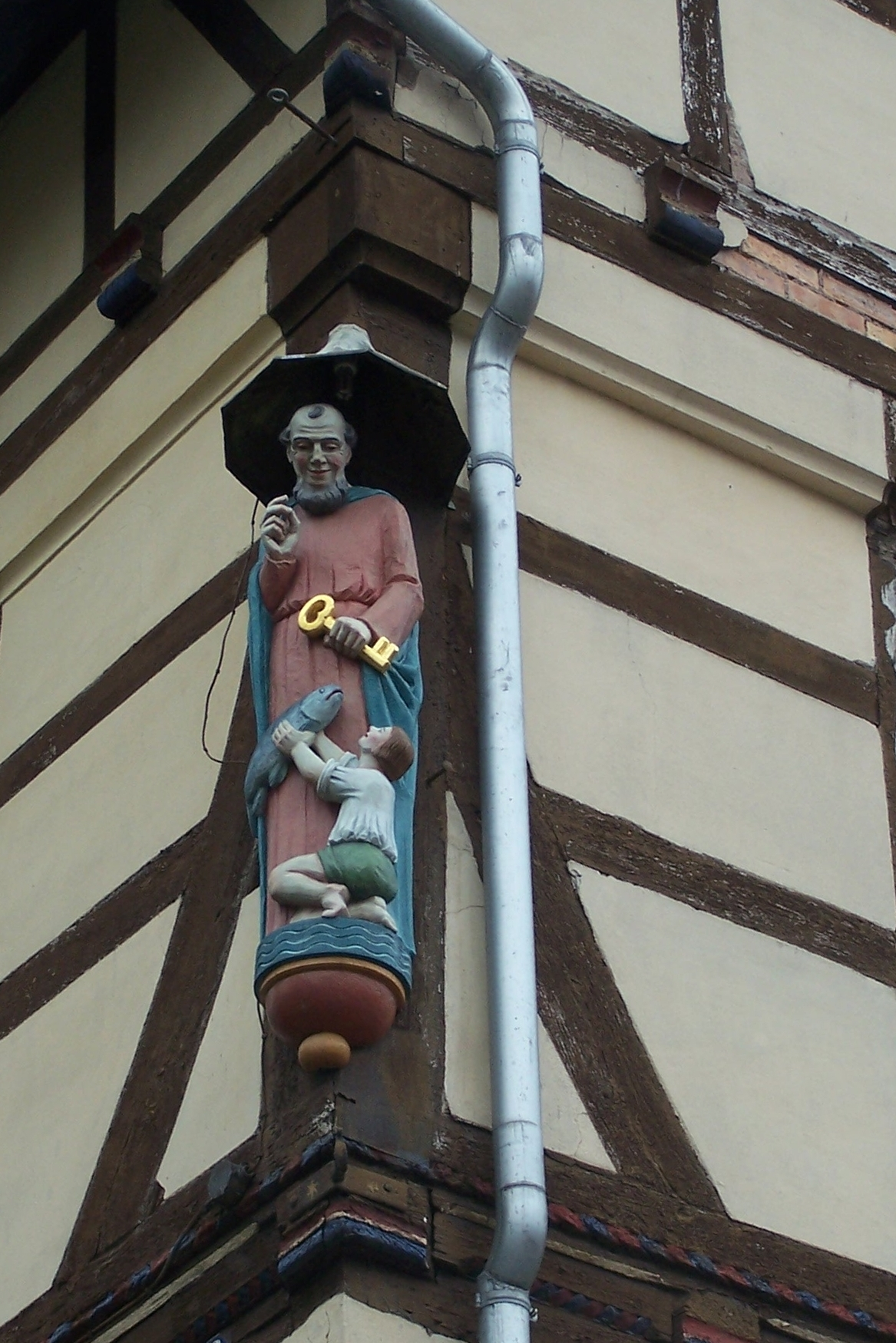 Dermbach